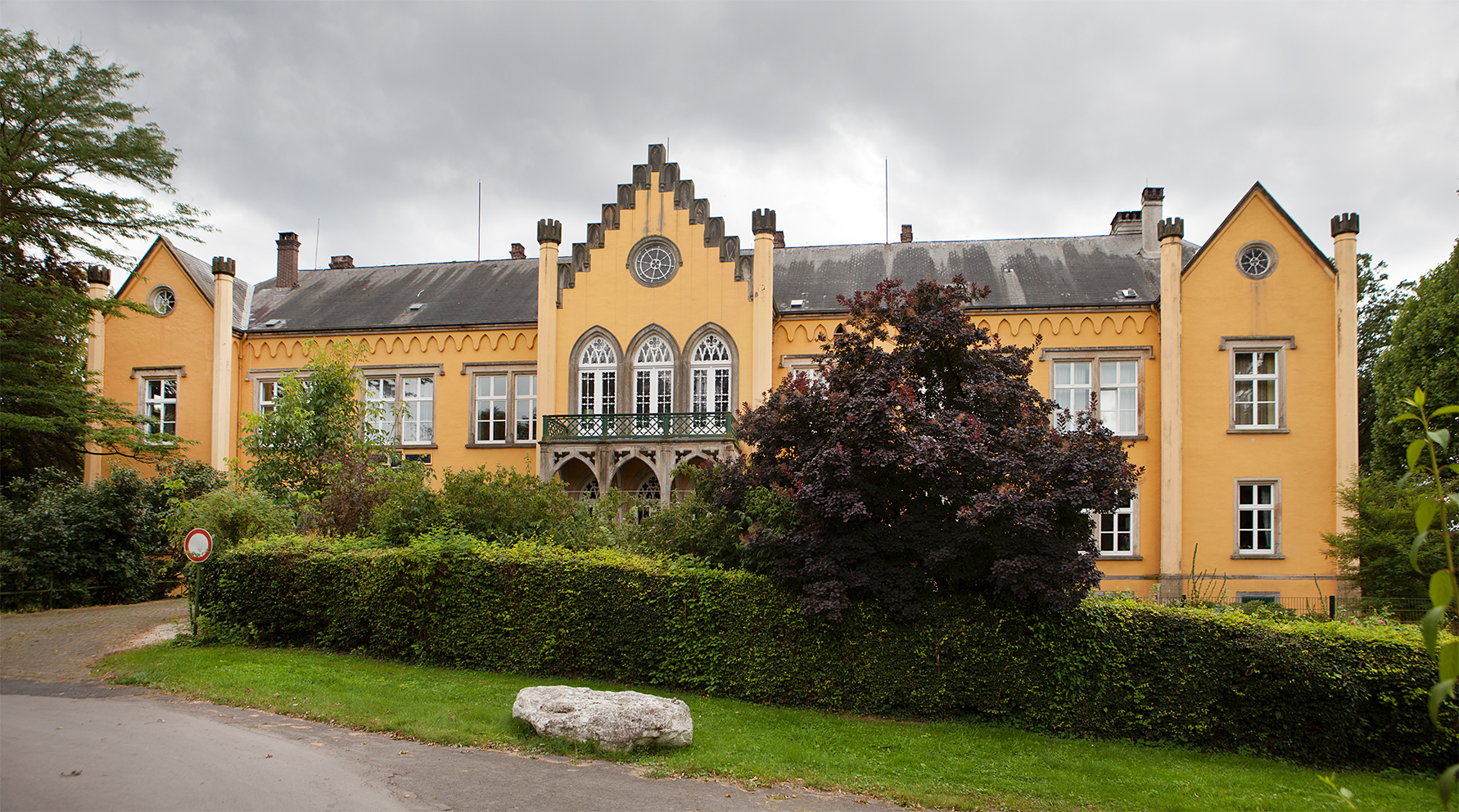 Schloss Iggenhausen in Lage-Pottenhausen, Ansicht von Norden This is the photograph of an architectural monument. It is part of the list of cultural monuments of Lage, no. 44